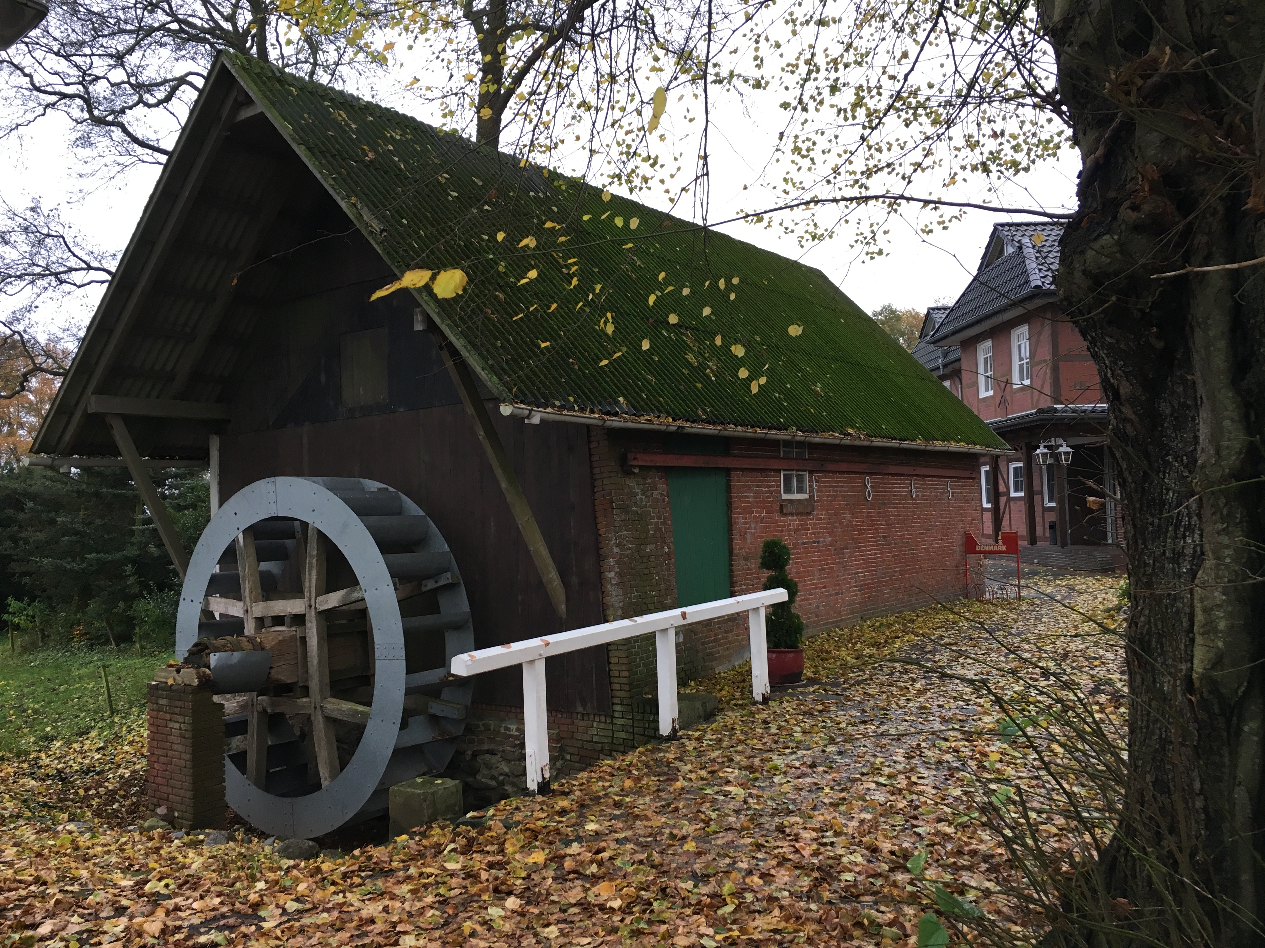 Hollener Möhl (von Westen), Hollen, Landkreis Cuxhoben